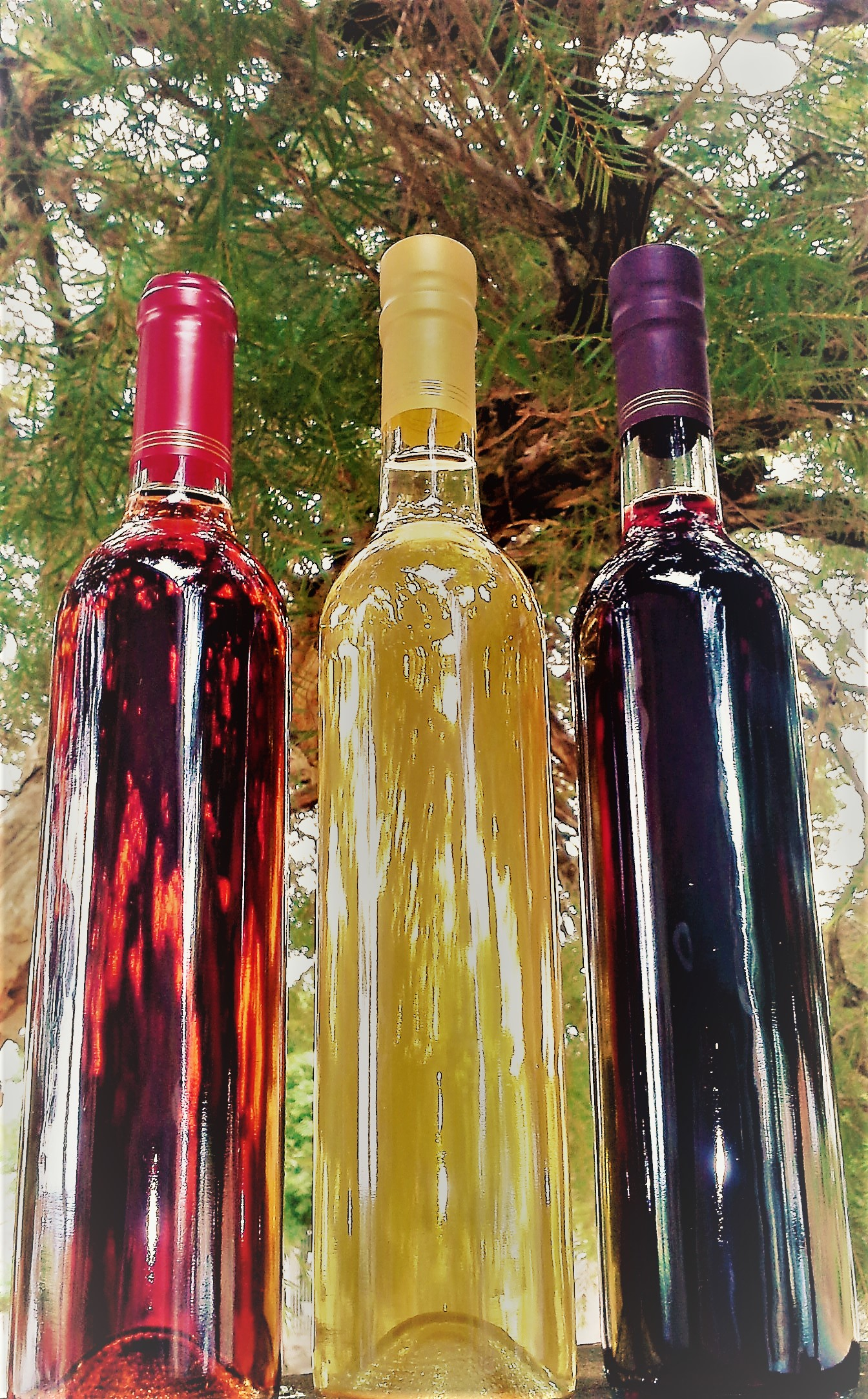 Da esquerda para direita: Melomel de Cereja, Hidromel Tradicional e Morat